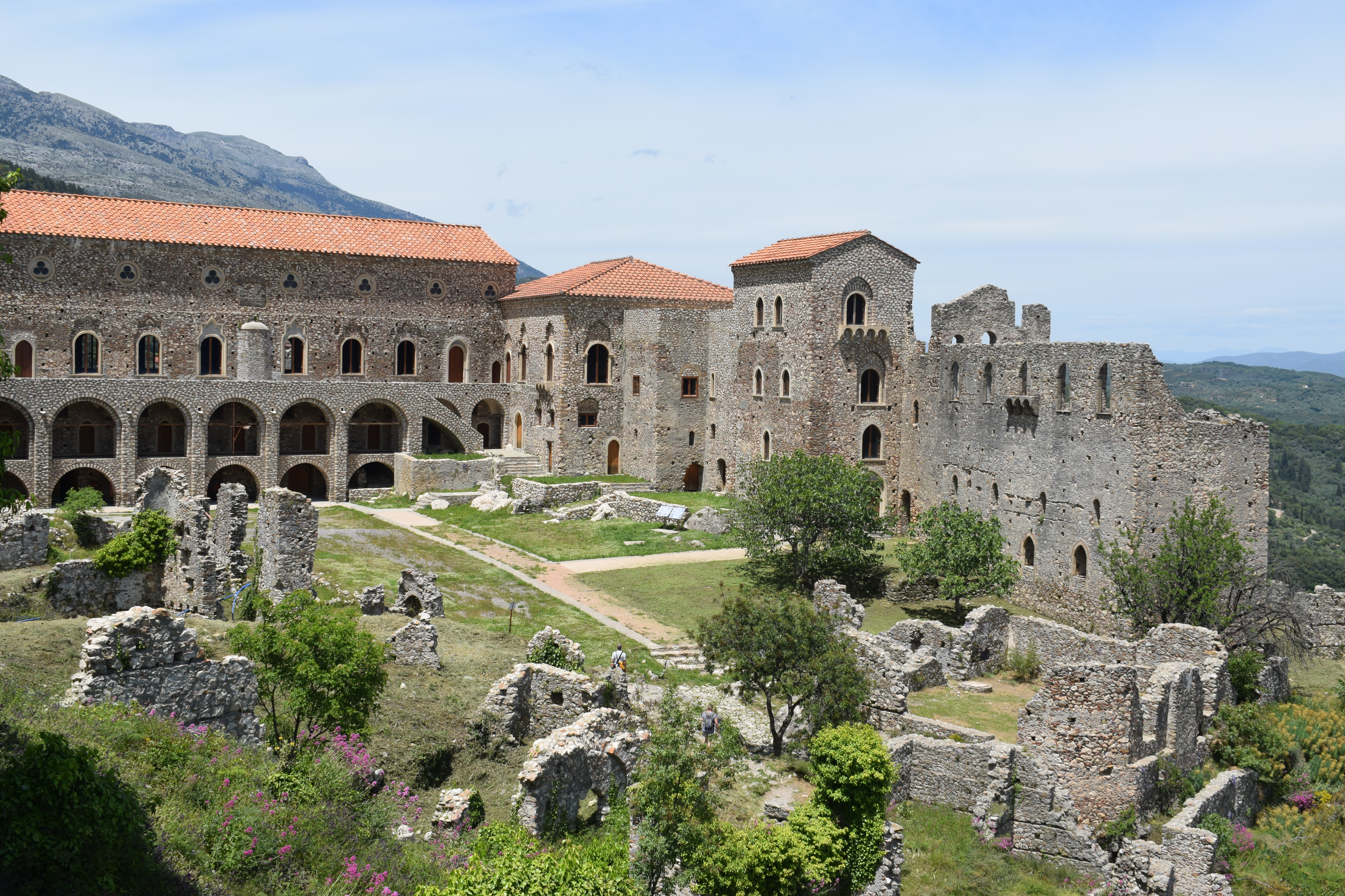 Vue de Mystras en Laconie, dans le sud du Péloponnèse en Grèce.